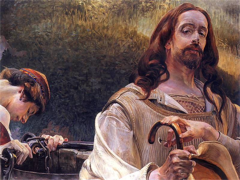 Jacek Malczewski (1854-1929) – polski malarz symbolista. Chrystus_i_Samarytanka 2